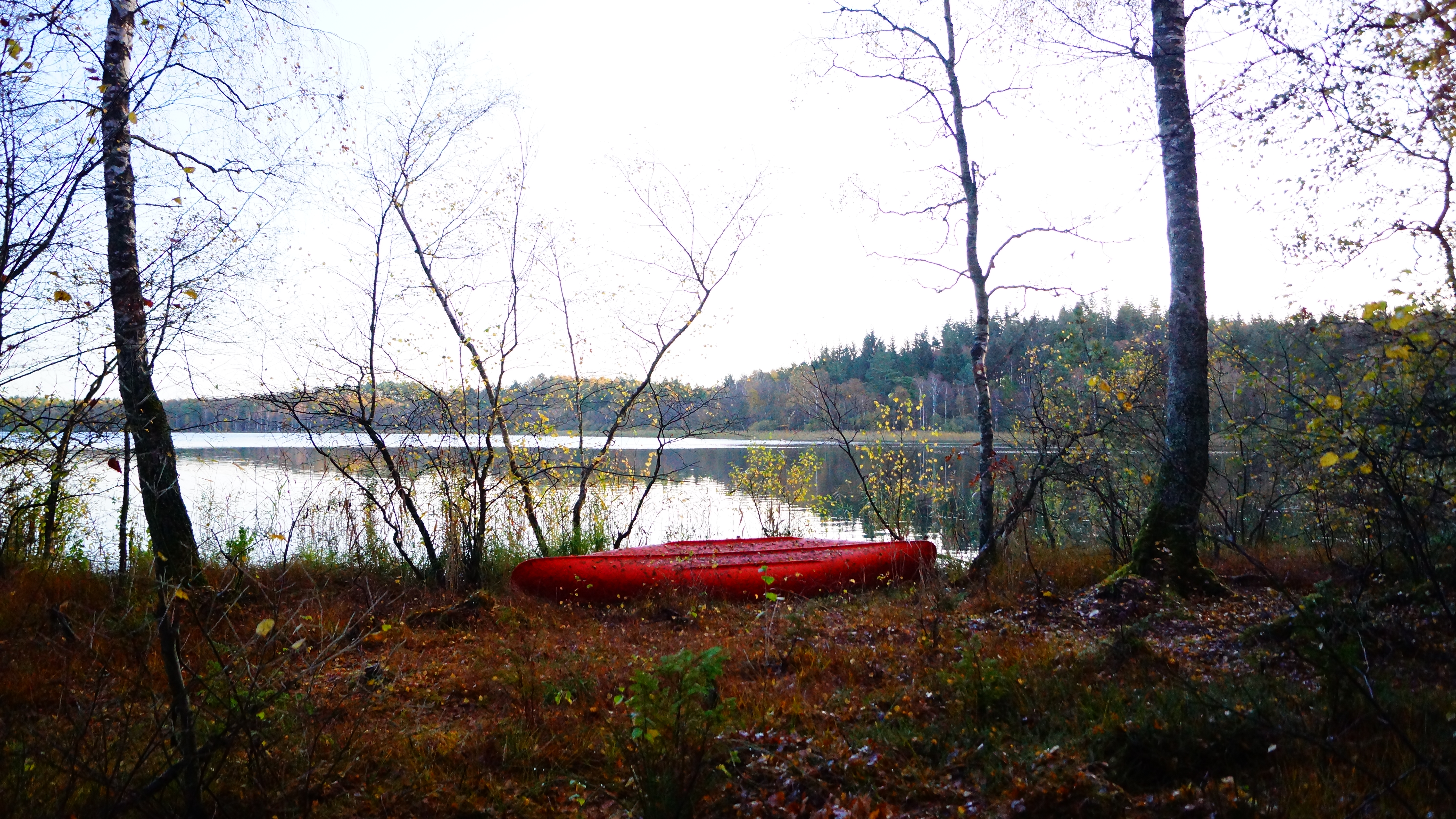 Øjesø m kajak